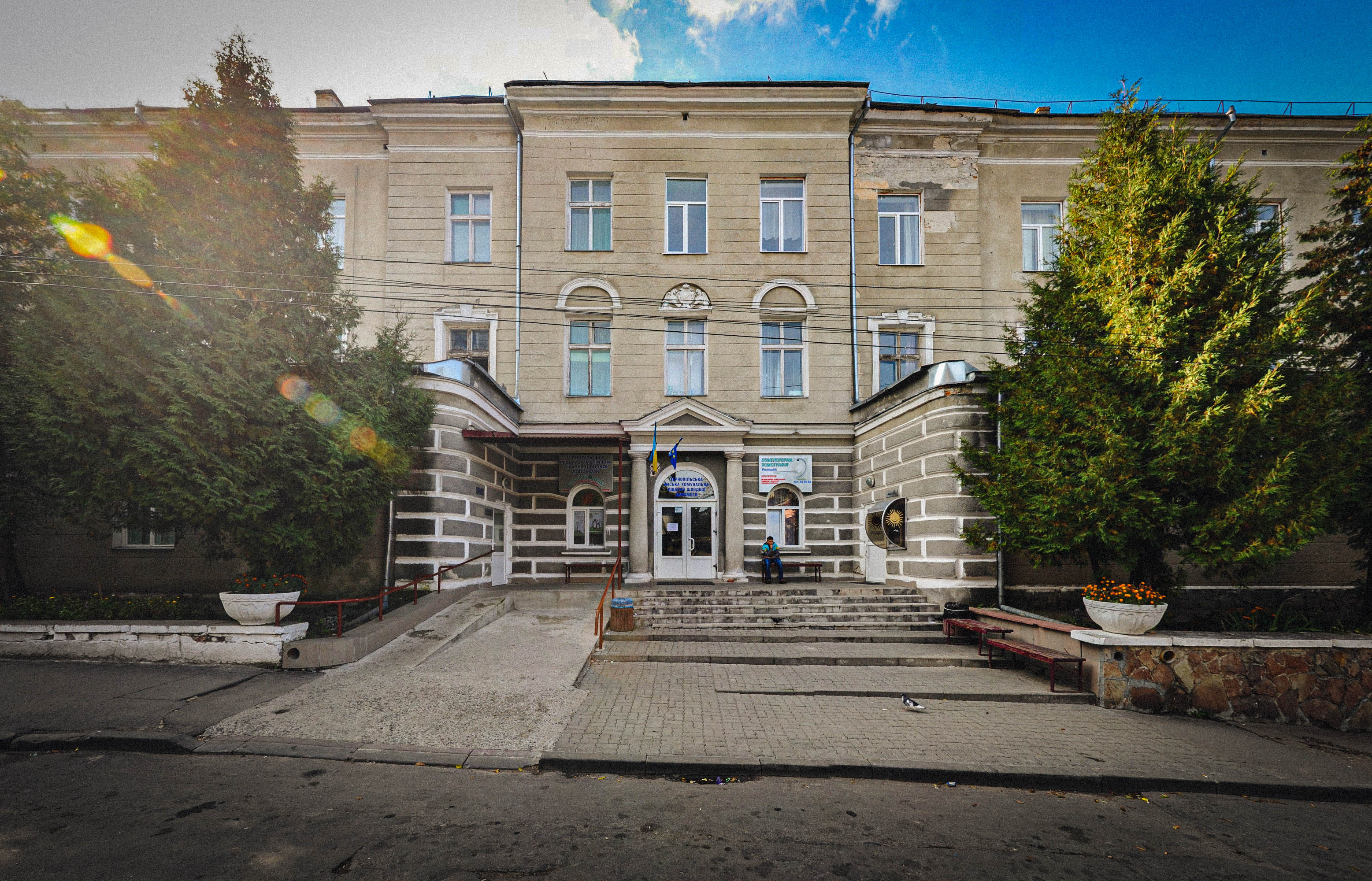 Міський шпиталь (мур.), Тернопіль, вул. Шпитальна, 2